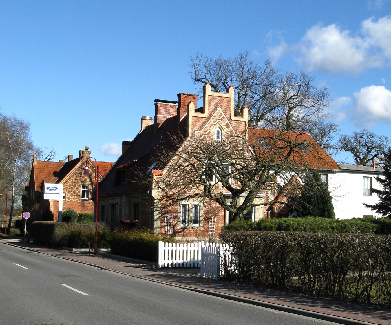 Typische Architektur in der Leezener Straße in Raben Steinfeld, Mecklenburg-Vorpommern